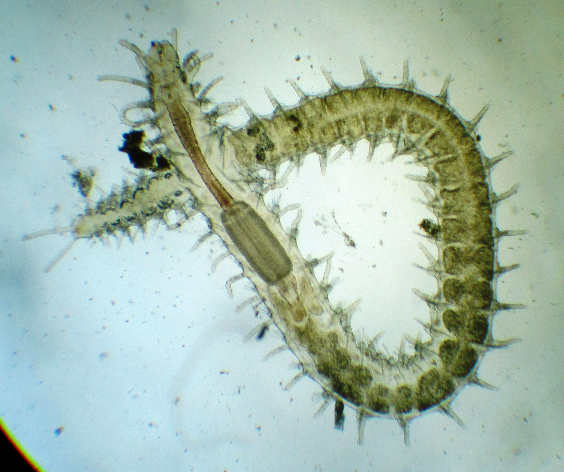 Syllis gracilis, Porto di Livorno, 0,5 m di profondità